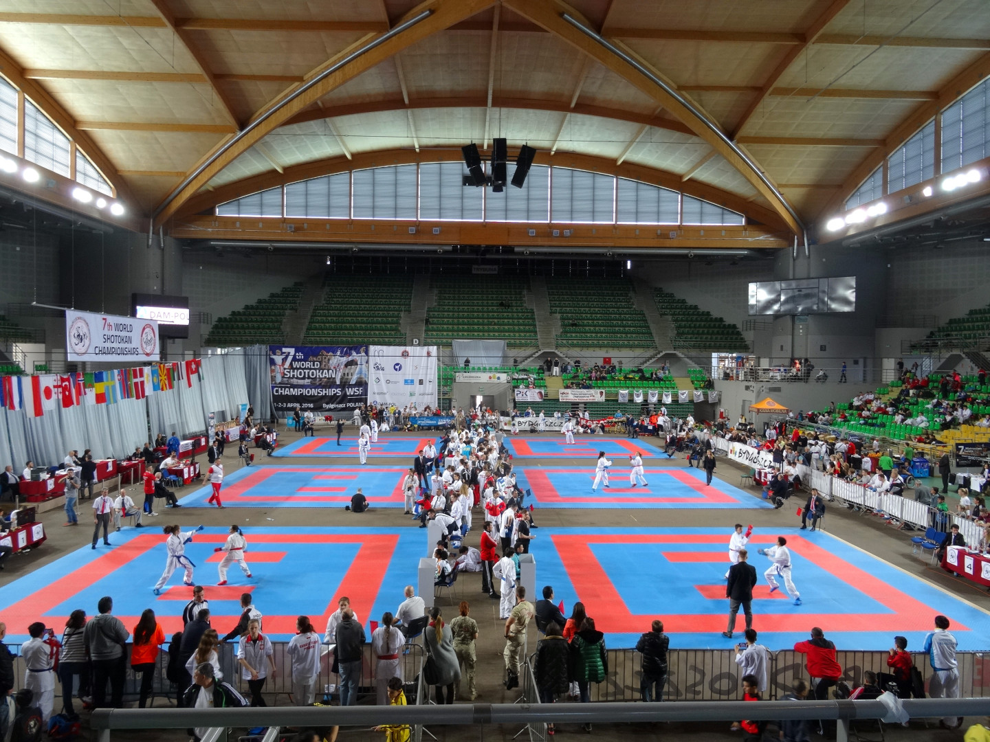 Mistrzostwa Świata Karate Shotokan w Bydgoszczy 1-3 kwietnia 2016 w hali Łuczniczka